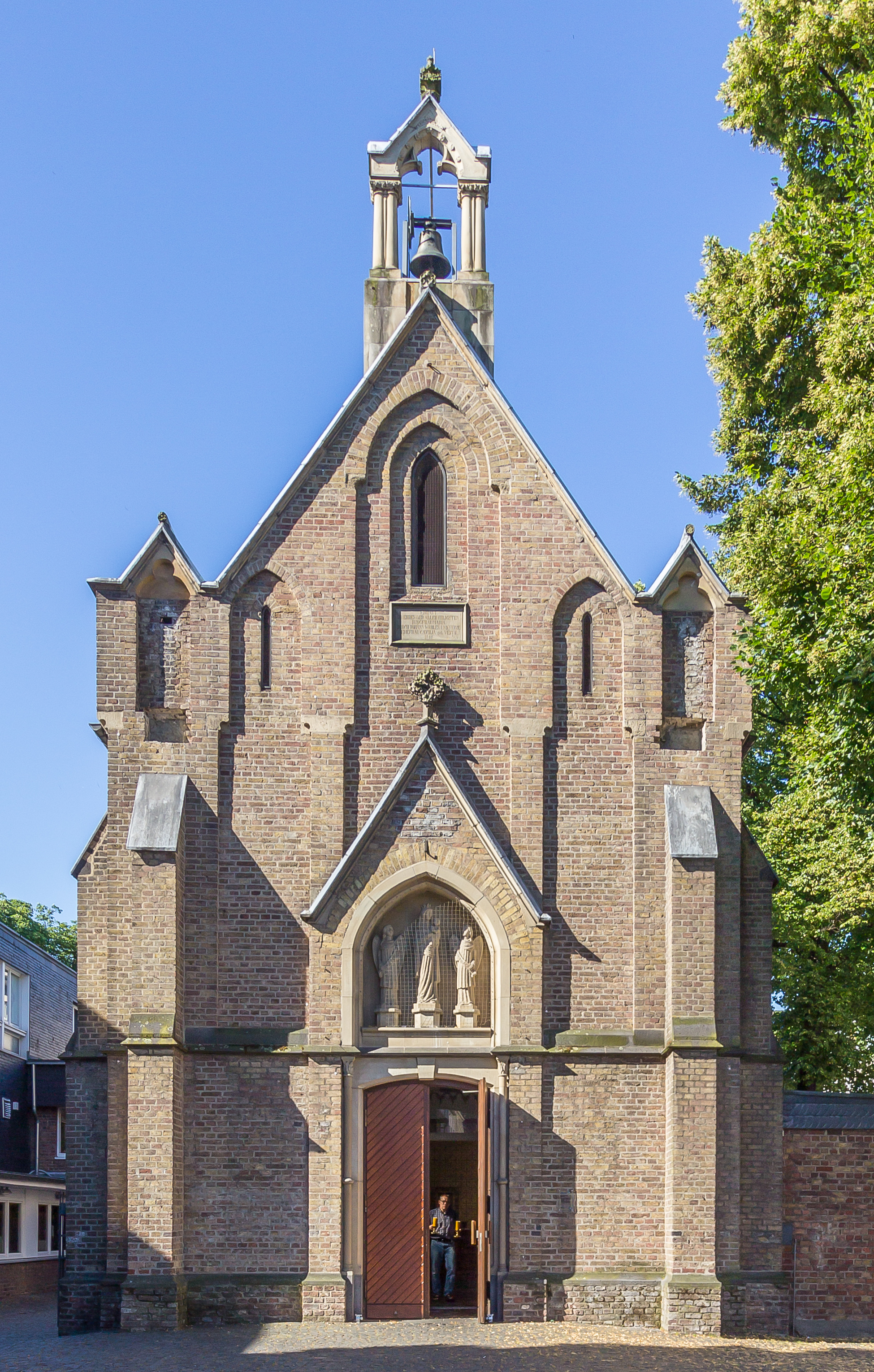 Marktkapelle St. Mariä Himmelfahrt, Köln-Ehrenfeld. Frontalansicht von der Venloer Straße